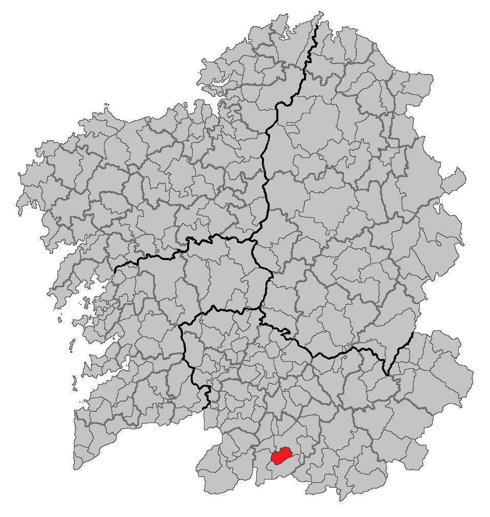 Mapa coa localización do concello de Os Blancos.